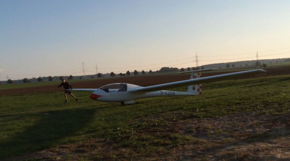 Astir CS während Start